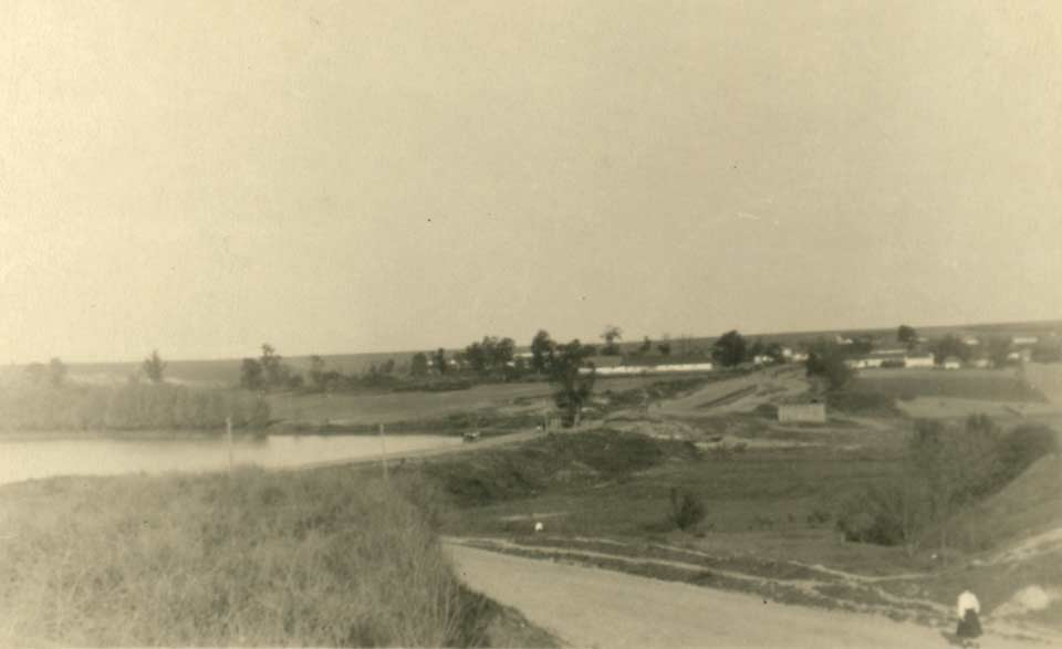 Артель «Світова Зірниця» Дата регистрации артели 23.08.1923